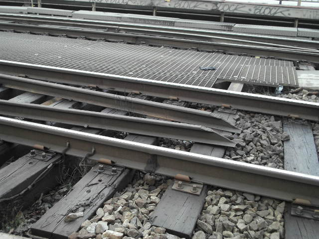 Skyddsräl